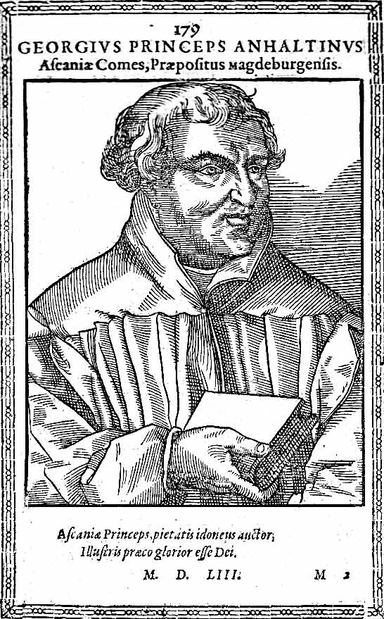 Georg III., Fürst von Anhalt-Dessau, genannt „der Gottselige“ (1507-1553) war ein deutscher Landesfürst, katholischer Priester und evangelischer Reformator.